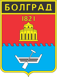 Герб Болграда